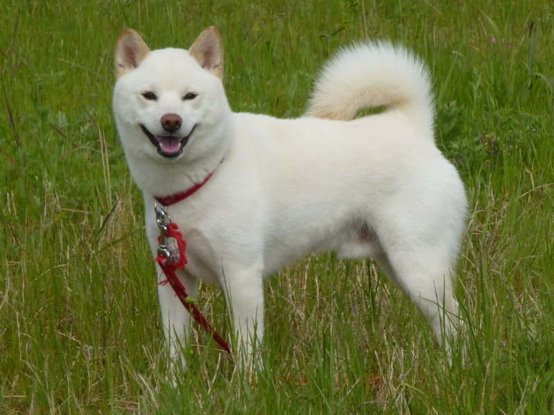 Shiba-Inu, one of the Japanese dog breeds Category:Dogs